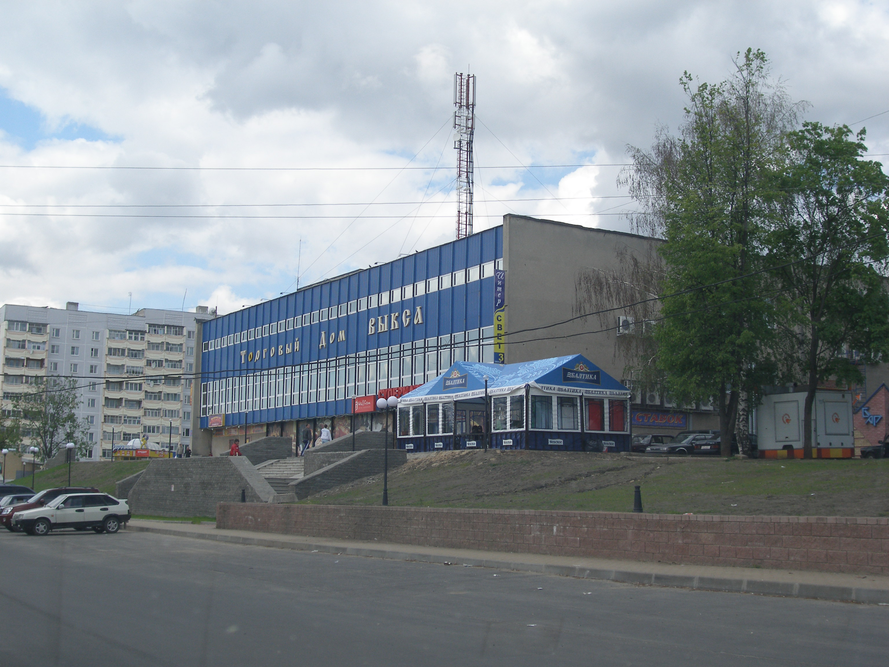 Выкса, В центре города, Универмаг